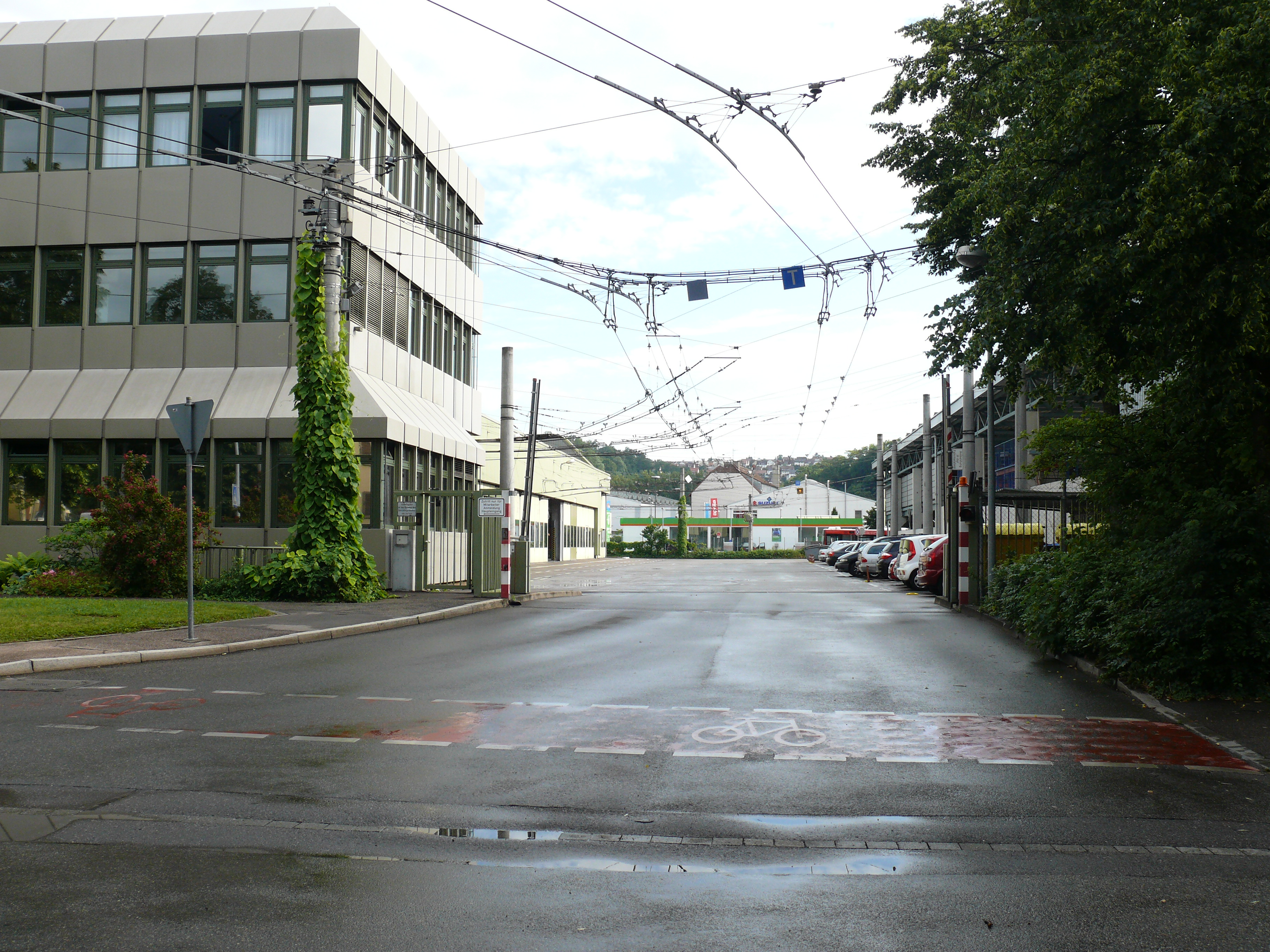 Einfahrt in den Betriebshof der Oberleitungsbusse in Esslingen am Neckar.